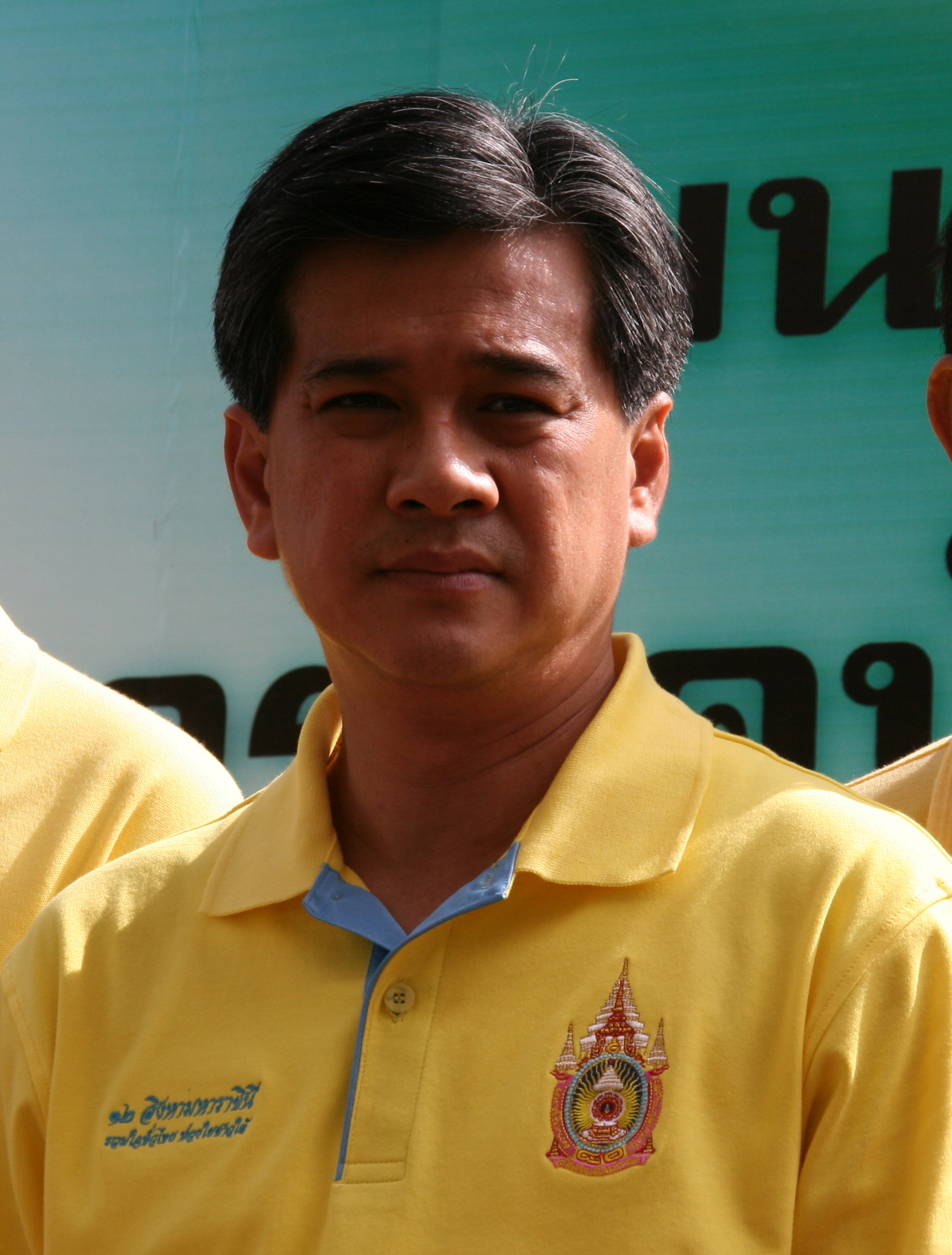 Apirak Kosayothin (นายอภิรักษ์ โกษะโยธิน - By A.Aruninta)